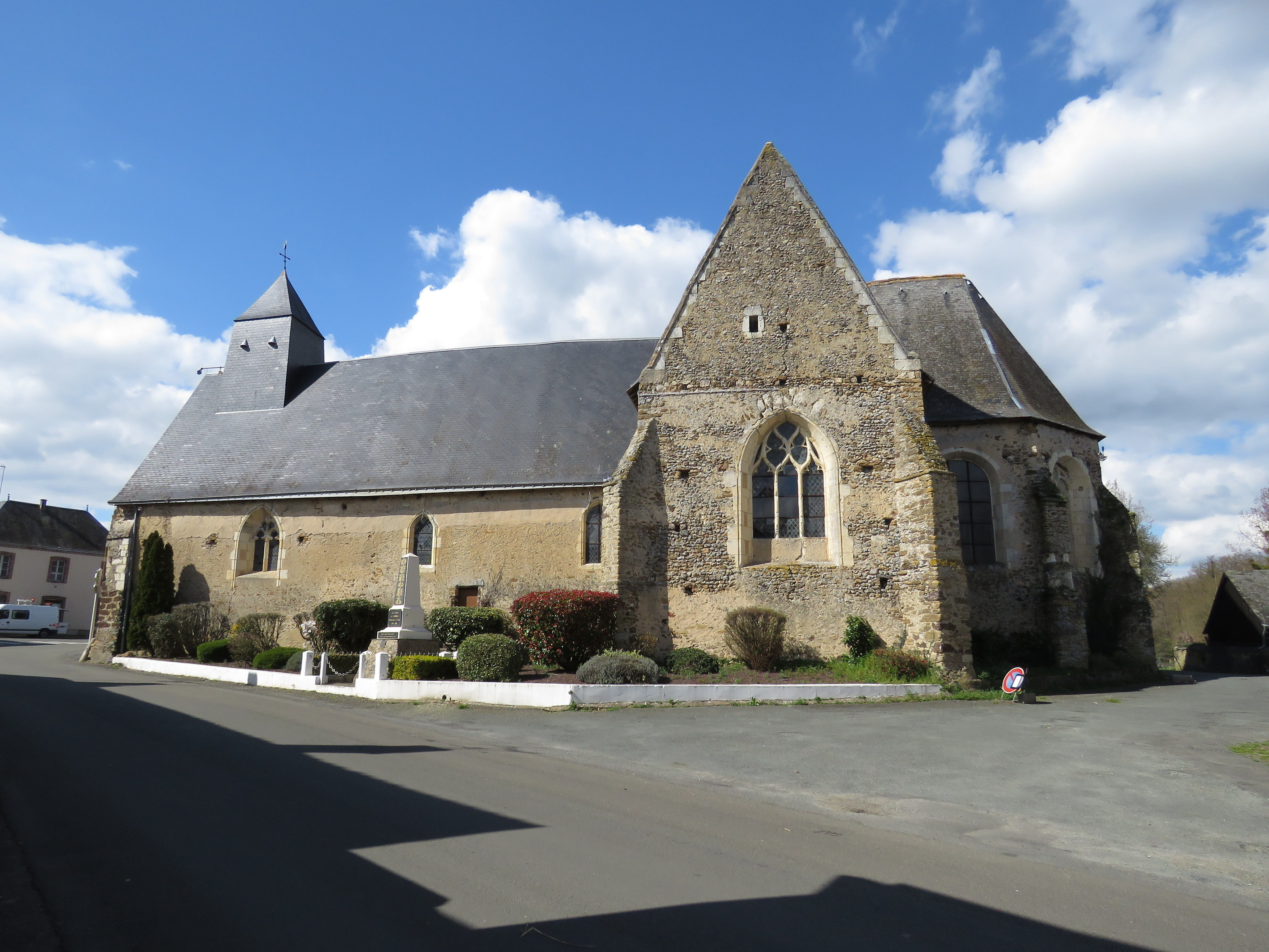 Église Saint-Martin.